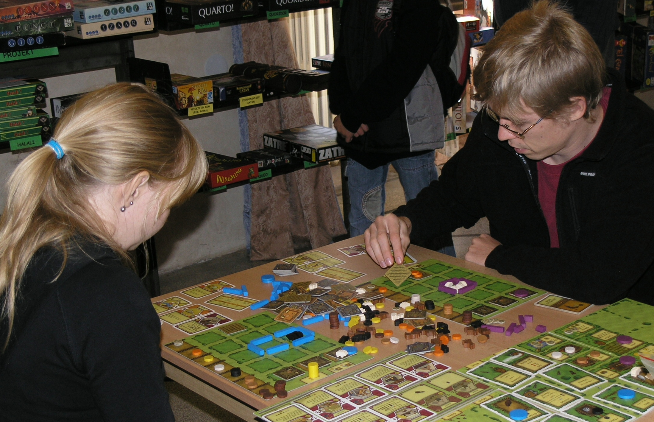 Deskohraní 2008